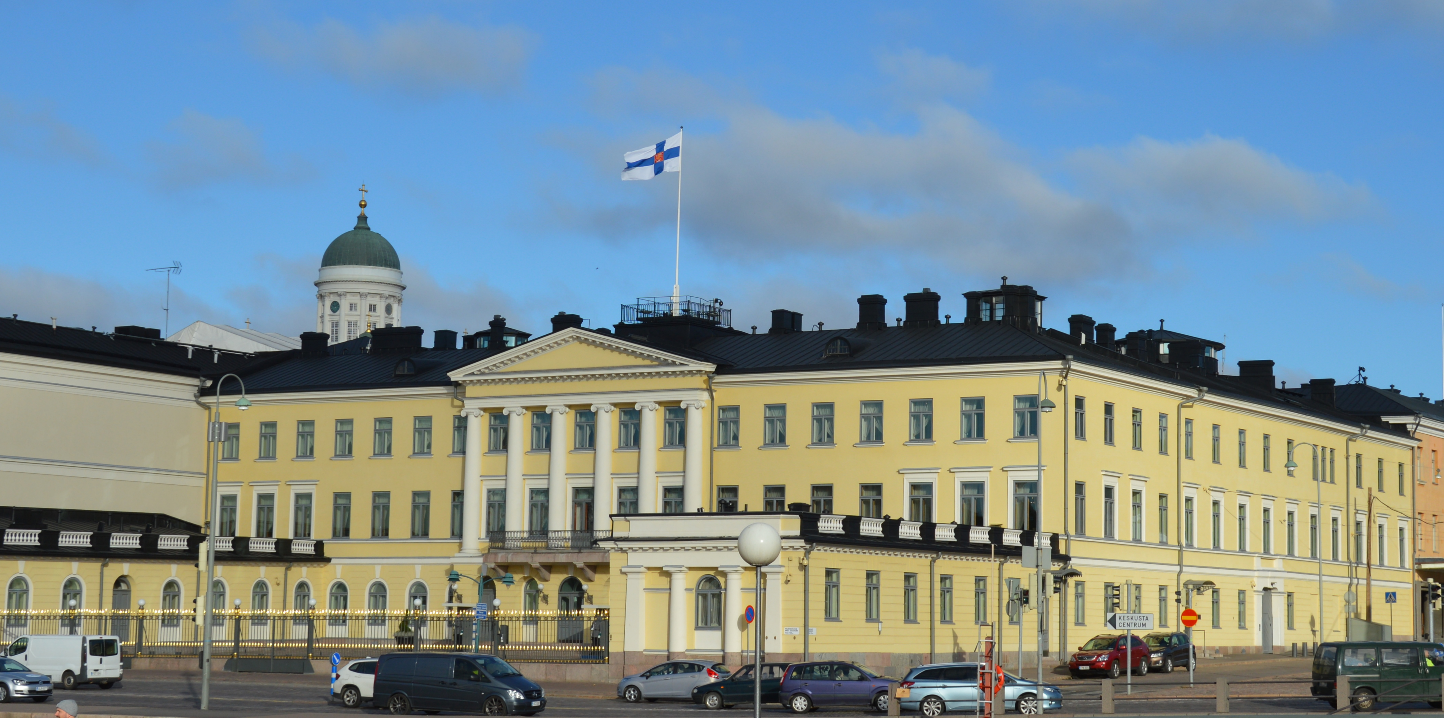 Präsidentenpalast Helsinki